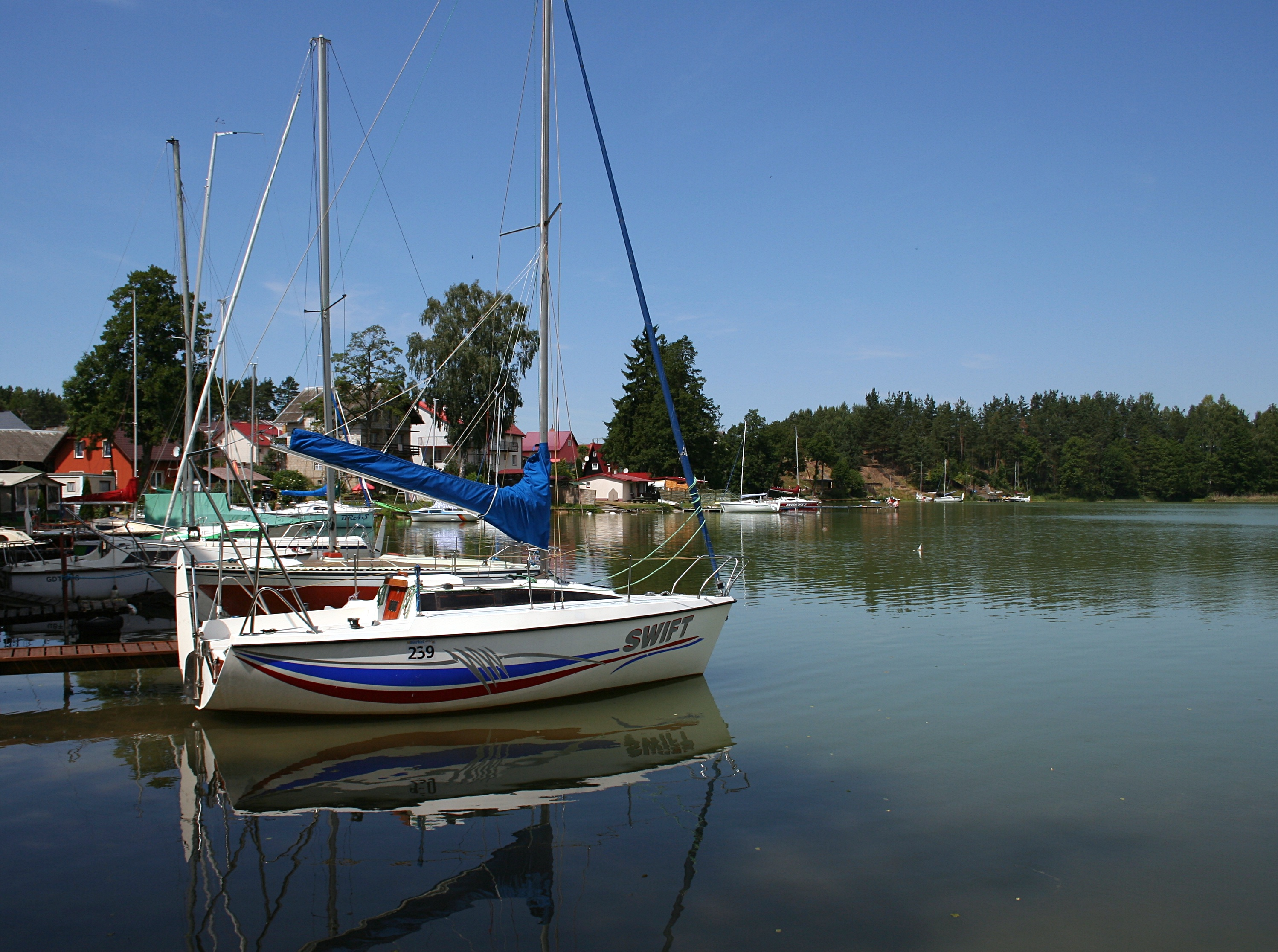 Wdzydzki Park Krajobrazowy, Czarlina - żaglówki na zachodnim brzegu Jeziora Jelenie